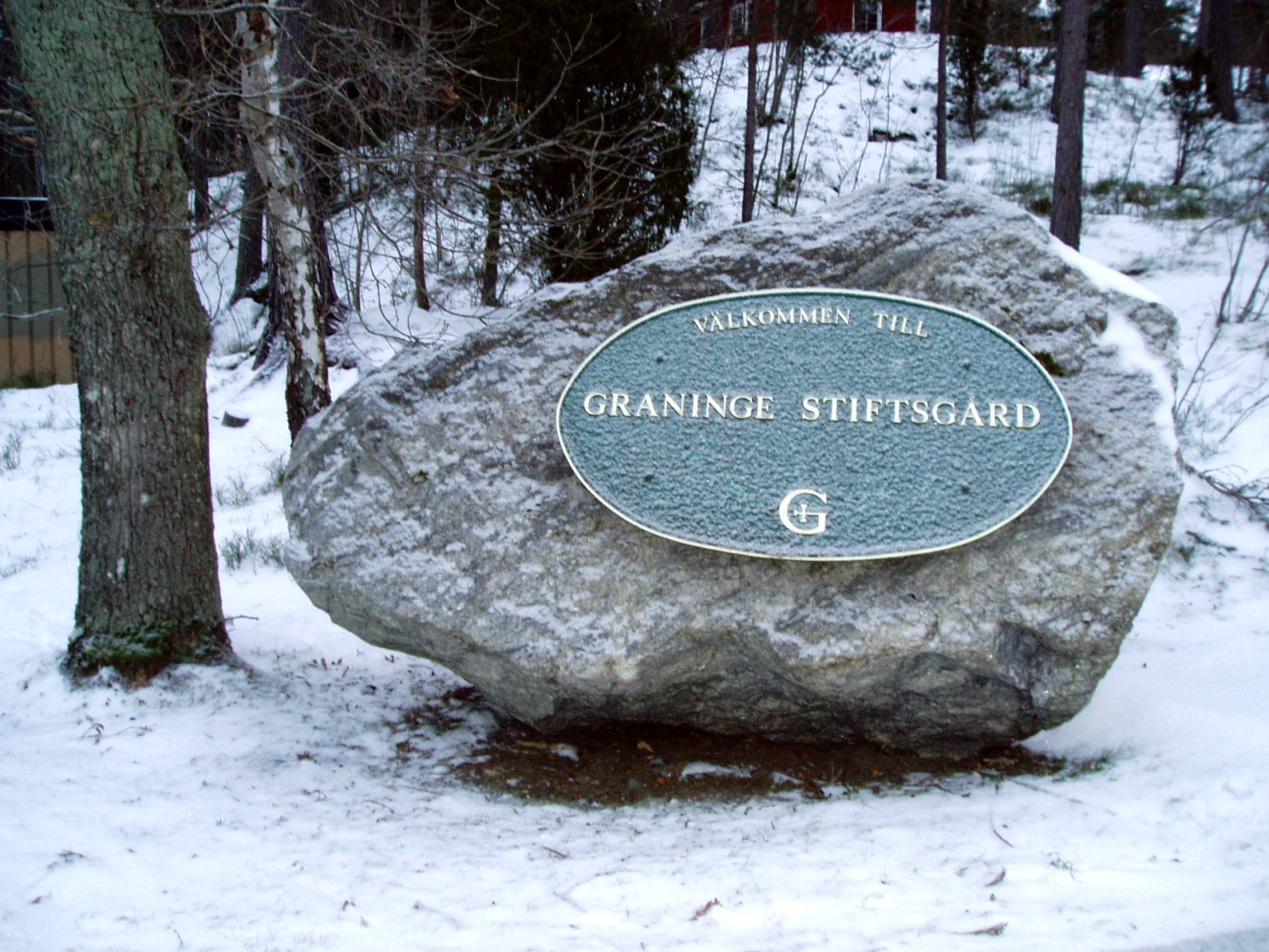 Graninge stiftsgård, entré